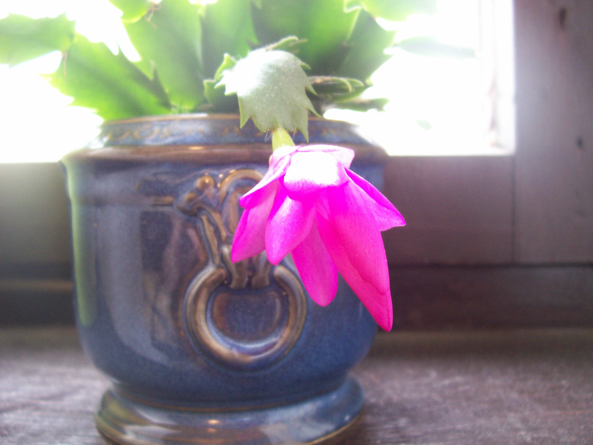 Karácsonyi kaktusz